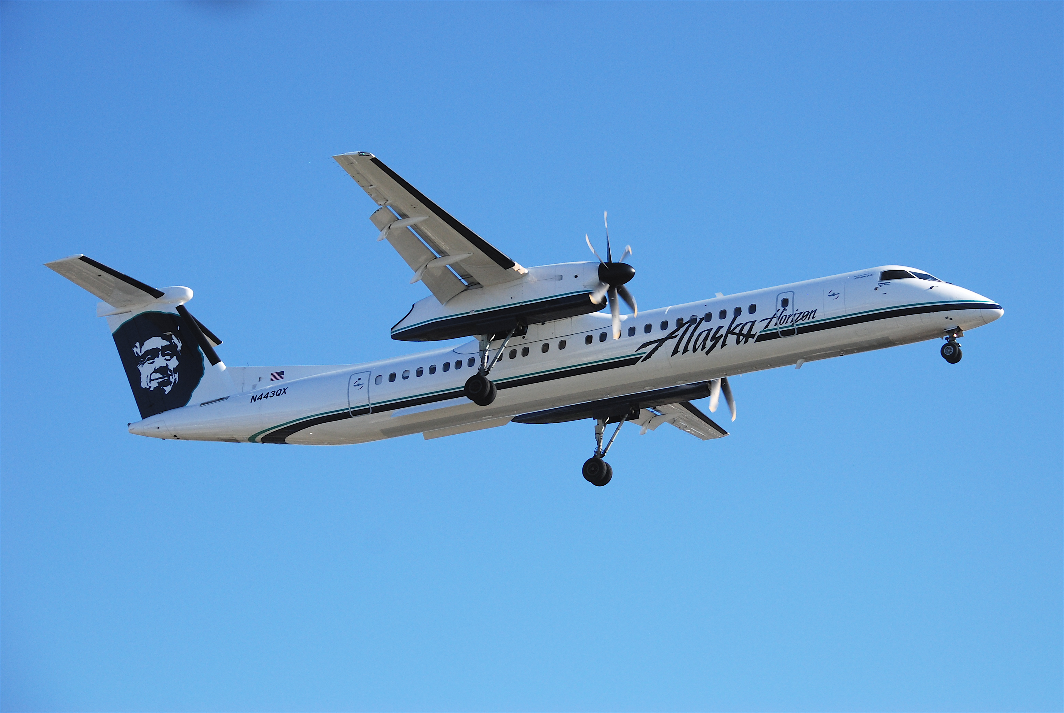 Alaska Airlines/ Air Horizon DHC-8-400; N443QX@LAX;08.10.2011/620dk